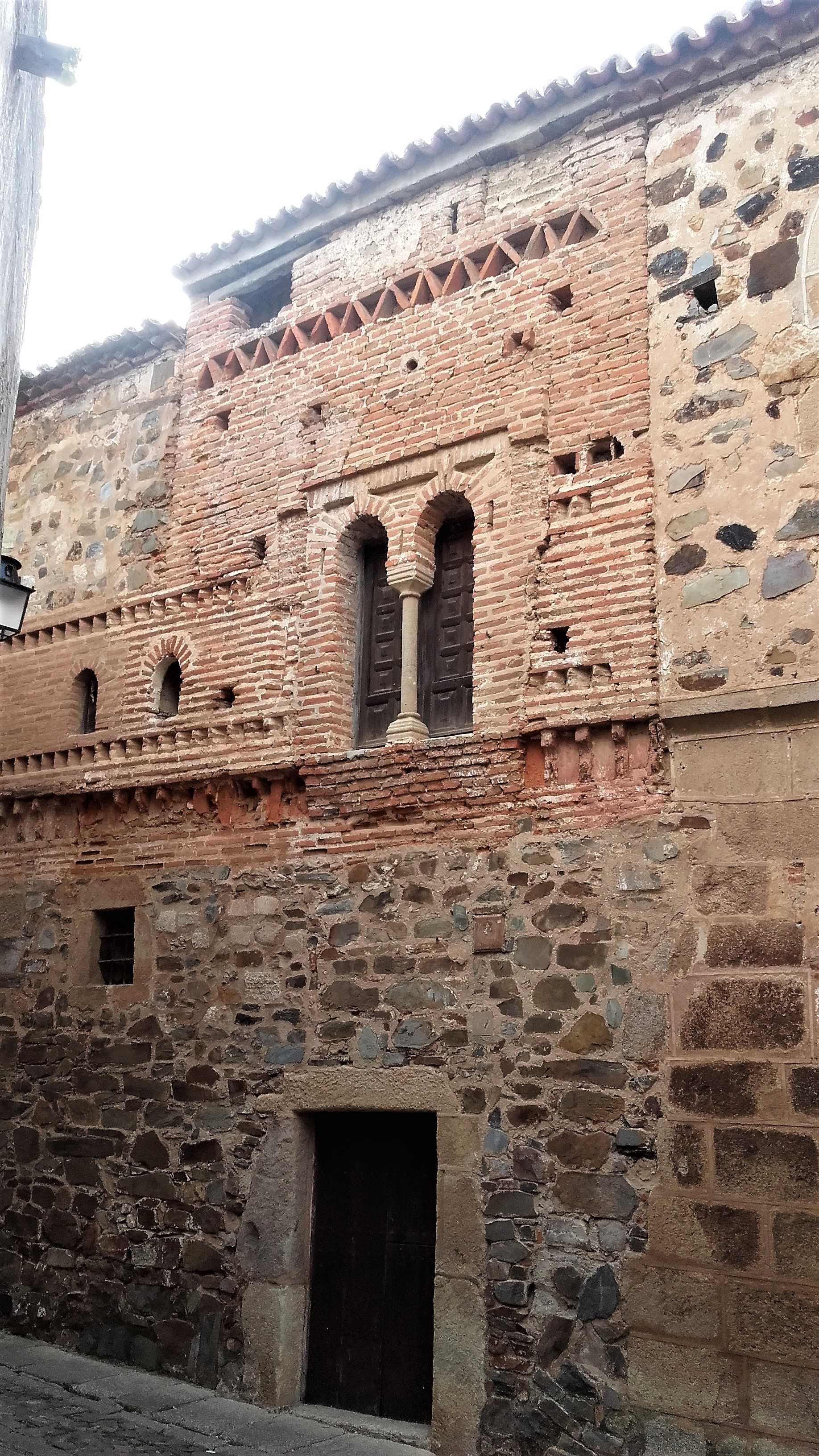 Casa Mudéjar de la Cuesta de Aldana. Único ejemplo de arquitectura mudéjar de la ciudad de Cáceres